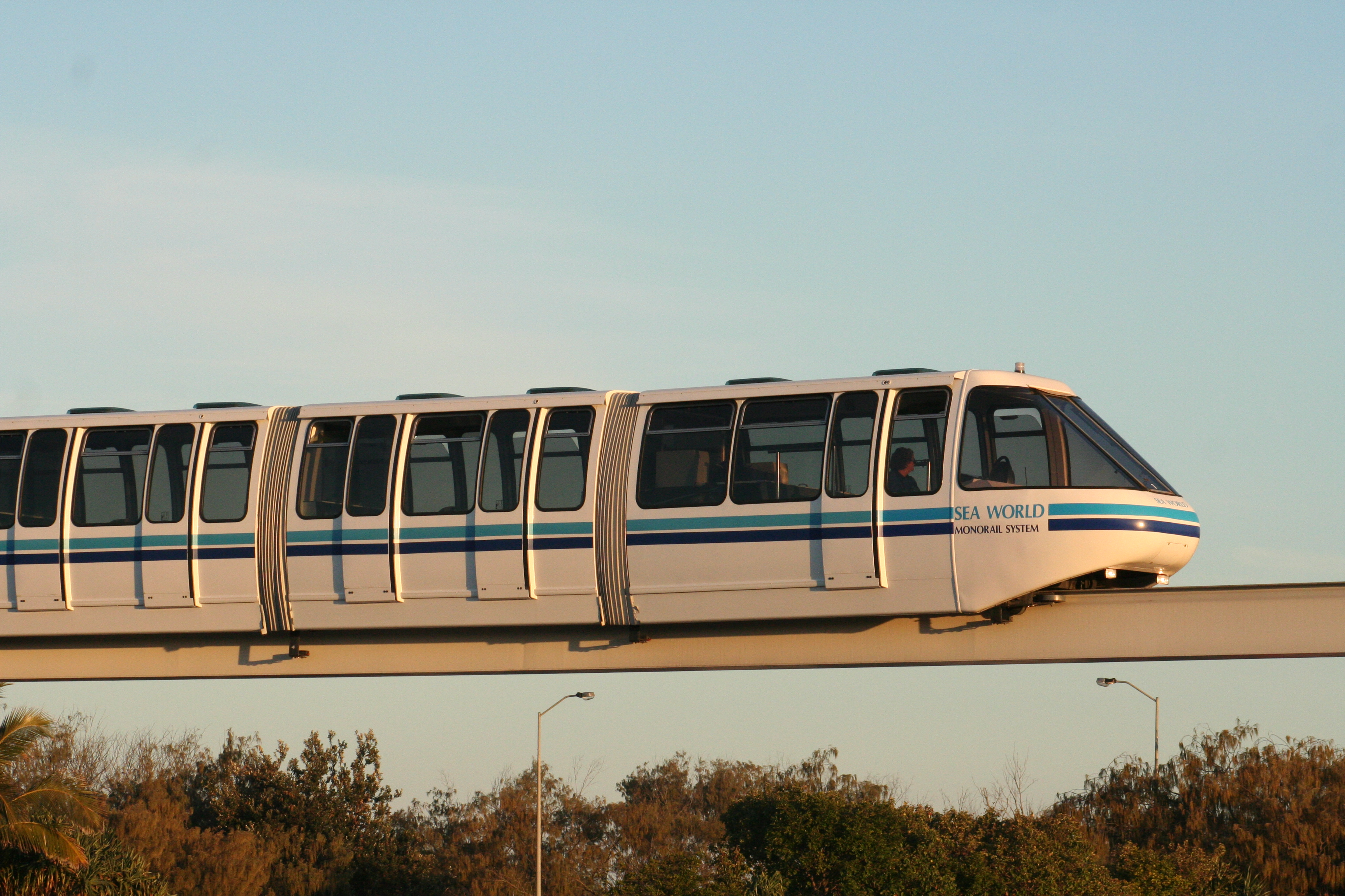 Monorail